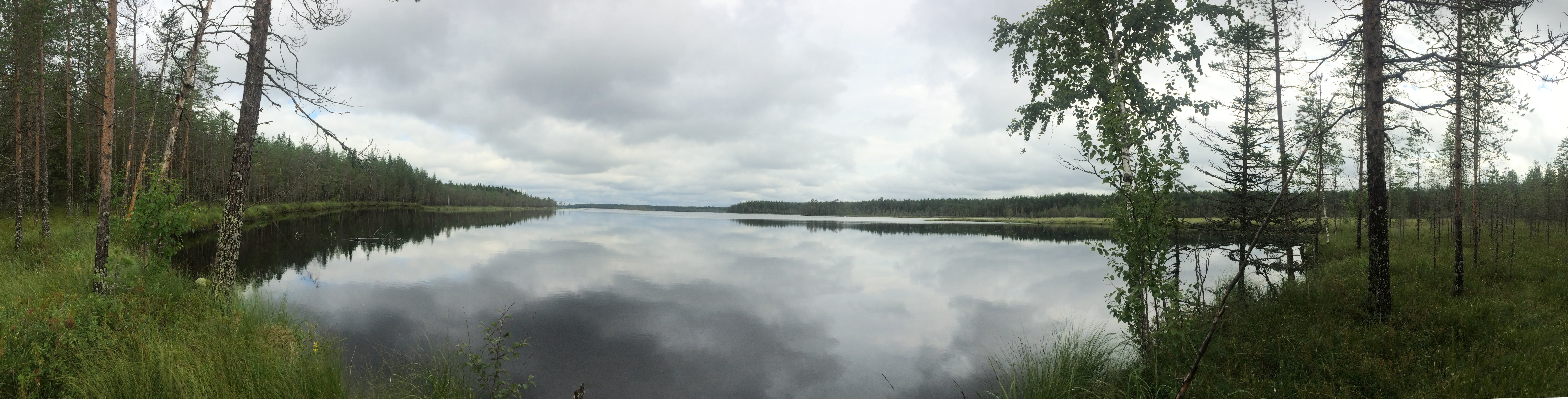 Вегарусъярви (озеро, исток Хейняйоки)